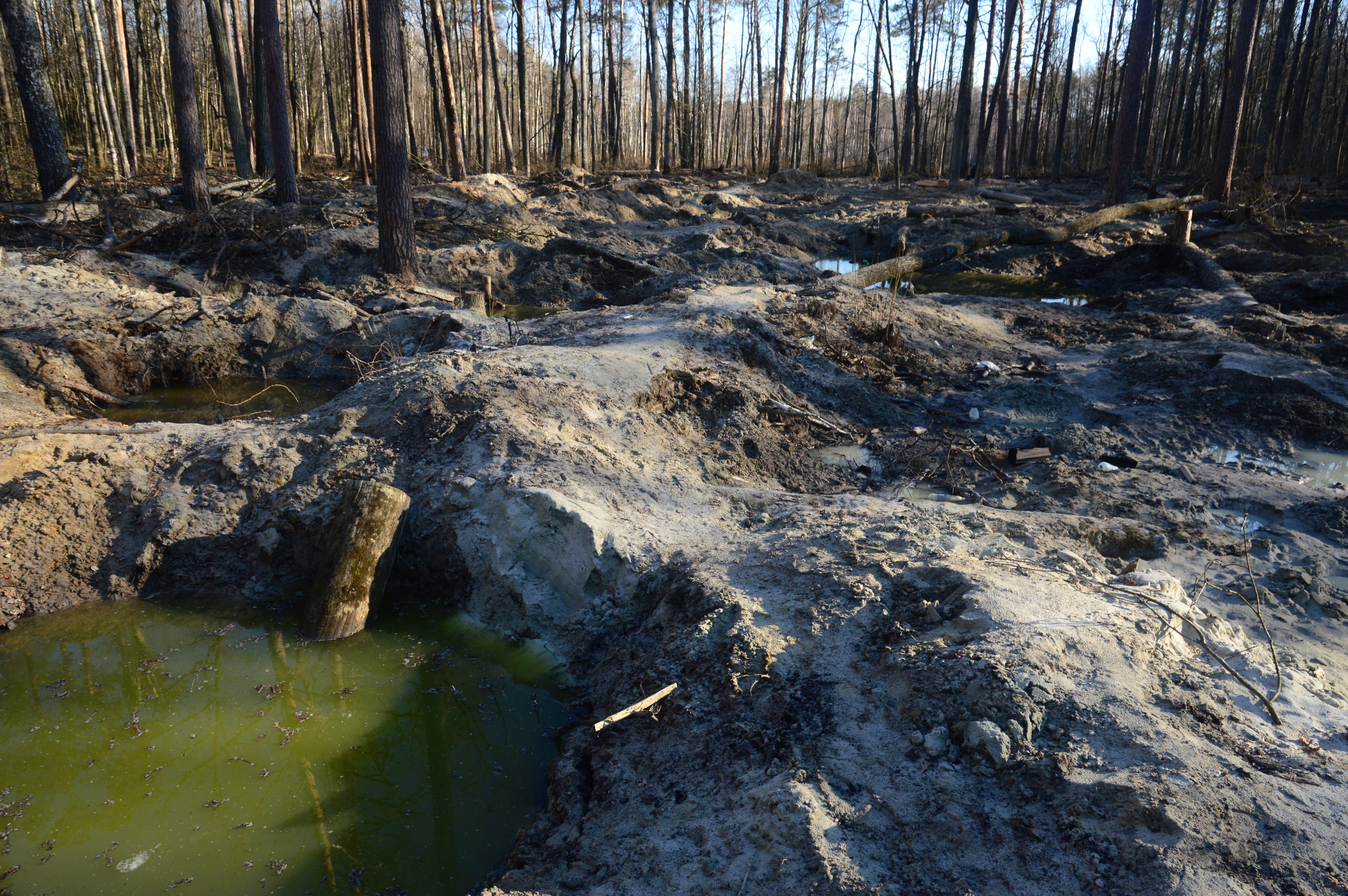 Поясківський, Олевський р-н Житомирської області. Одна з найстаріших лісових ділянок Українського Полісся.